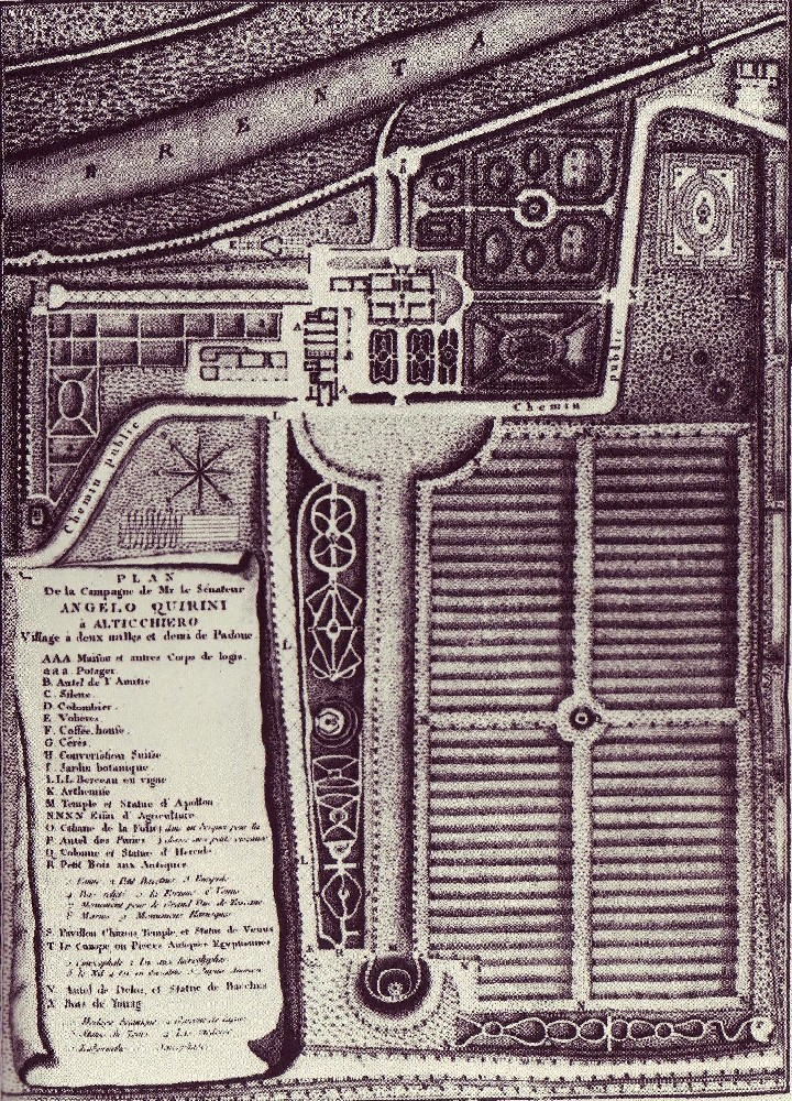 Alticchiero Incisione di Antonio Sandi (1733-1817) a corredo del libro Alticchiero (Padova, 1787) di Giustiniana Wynne con la pianta della proprietà di Angelo Querini ad Altichiero (Padova).